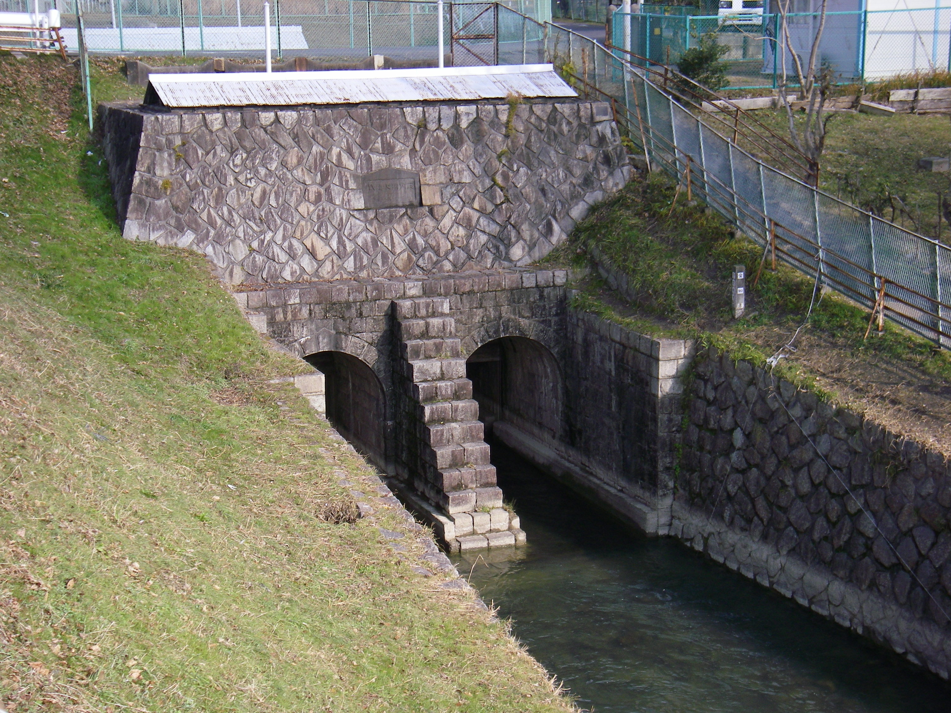 庄内用水元杁樋門（愛知県名古屋市守山区） 庄内用水・堀川の水源に位置する樋門